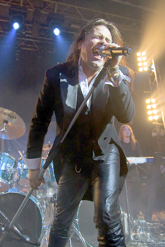 André Matos. Joy Eslava (Madrid), 16/01/2009